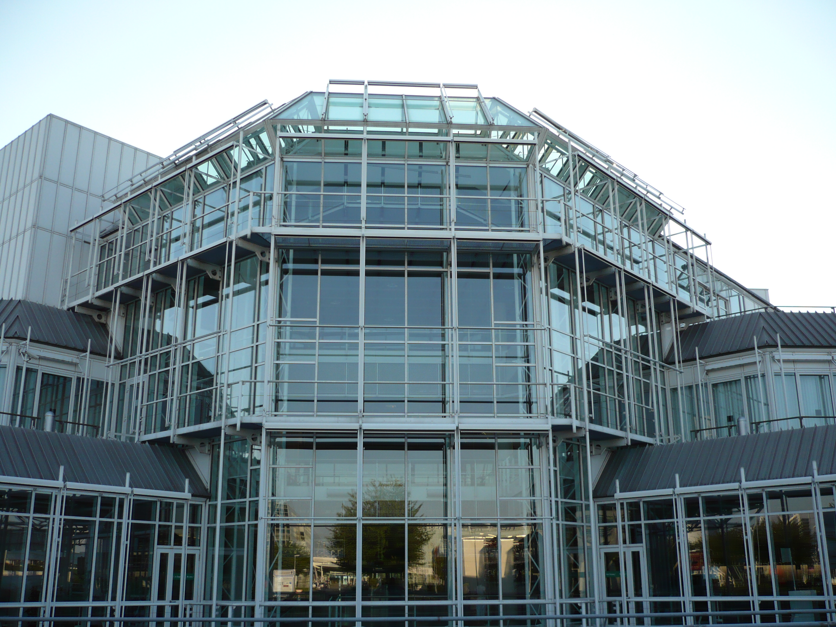 Terminal 1 Flughafen Münchens